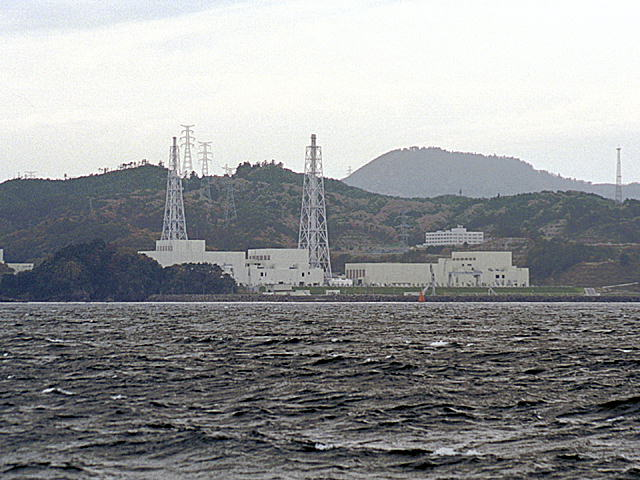 東北電力の女川原子力発電所。2003/11/16に付近の海上よりnekosuki600が撮影。